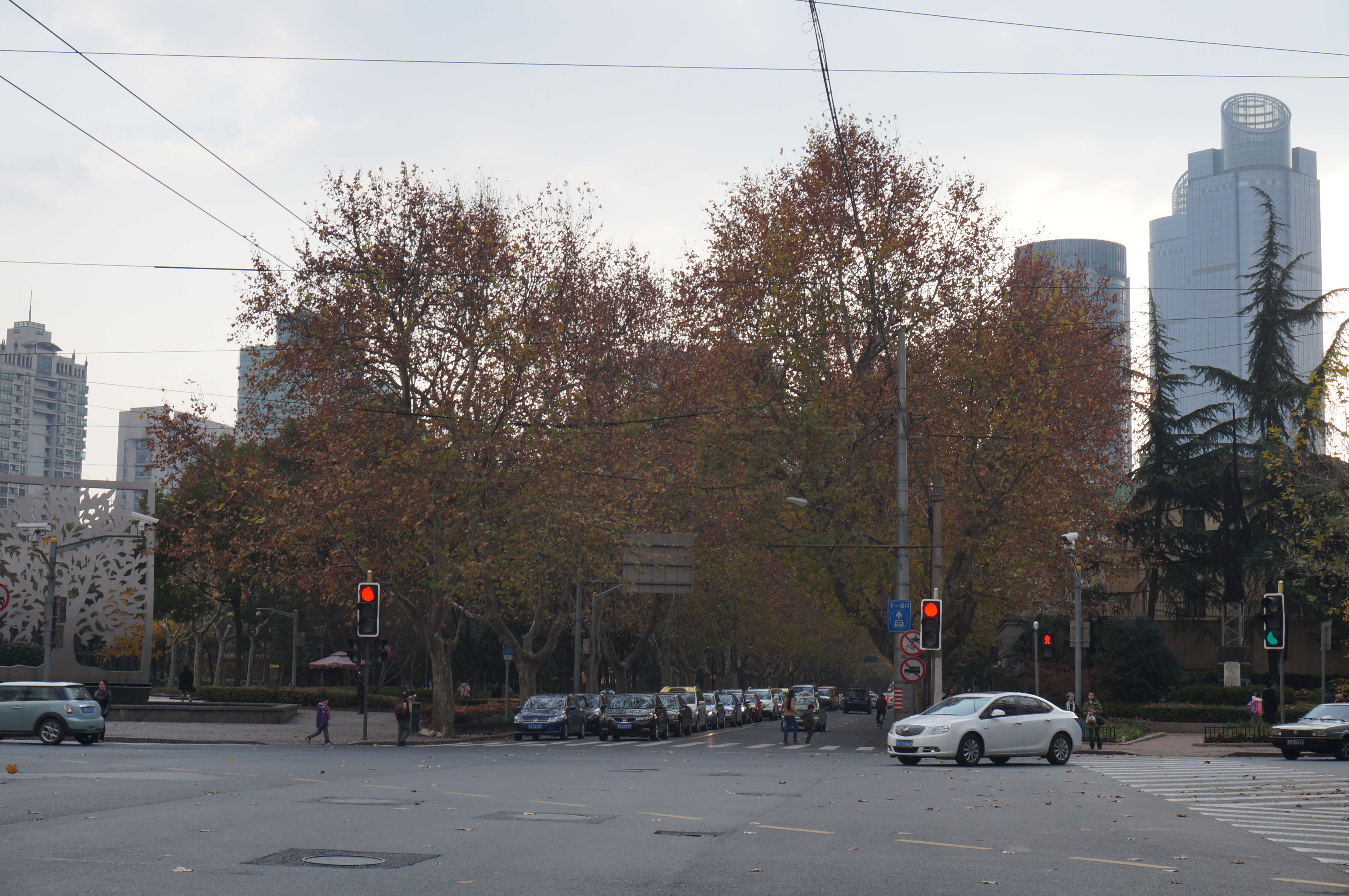 上海衡山路